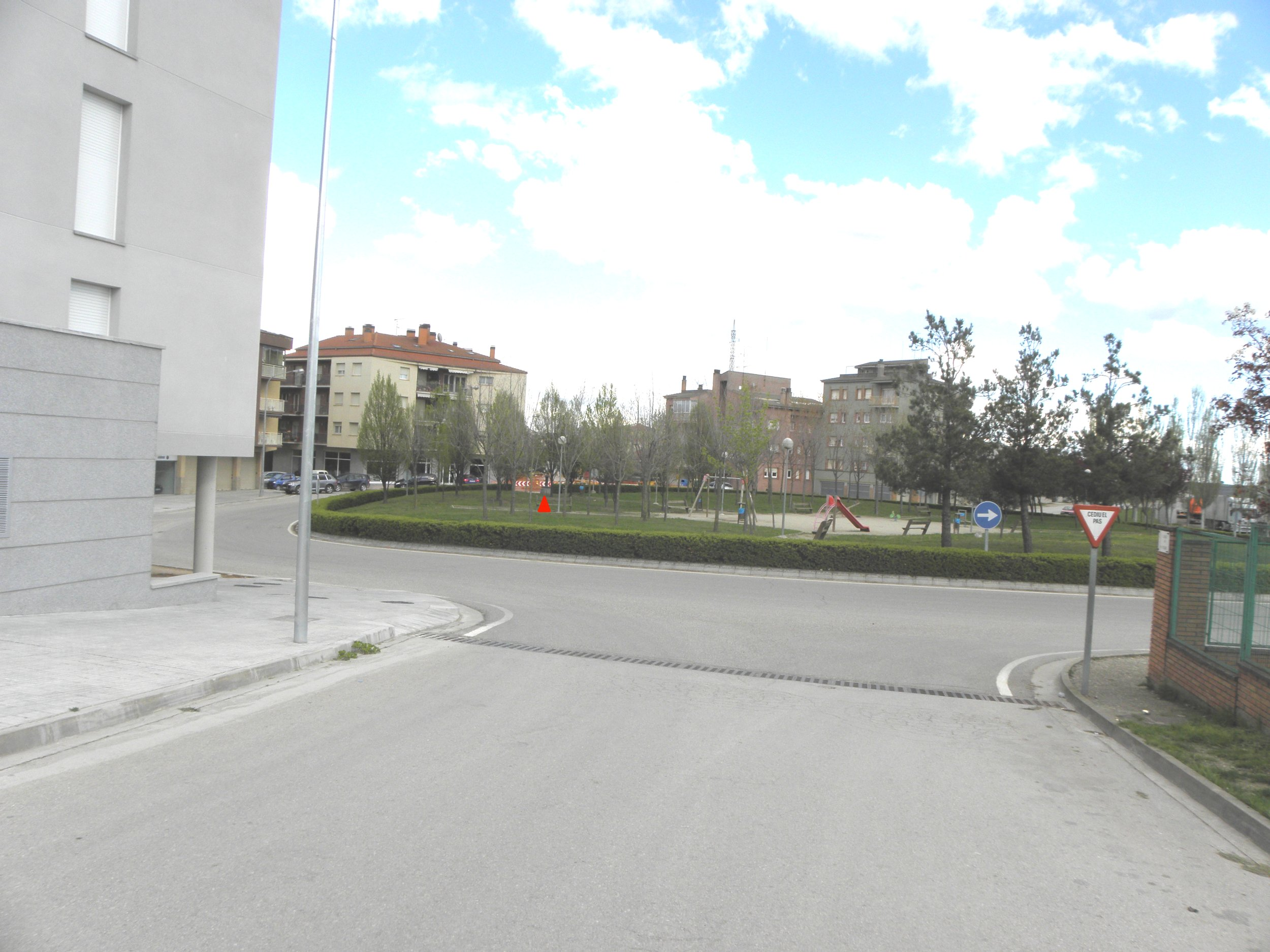 La plaça de Sant Jordi, a Solsona (Solsonès) amb la font assenyalada amb un triangle vermell